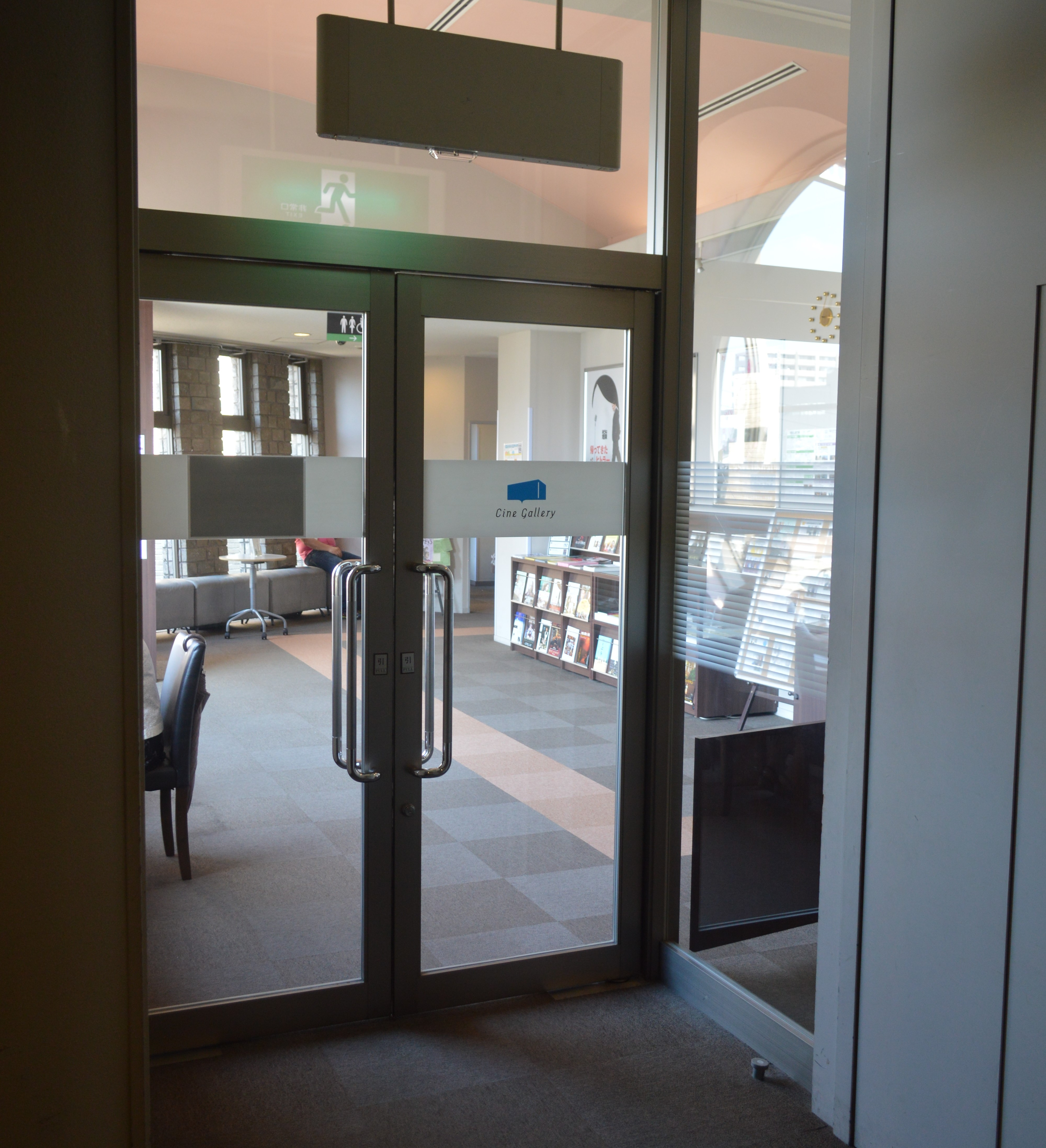 静岡市のサールナートホールに入っている映画館（ミニシアター）、静岡シネ・ギャラリー。